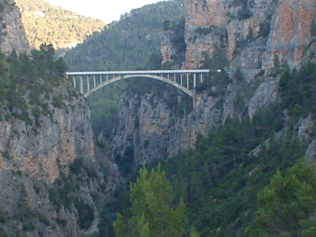 Puente Grande Las Rinconadas / Santa Cruz de Moya